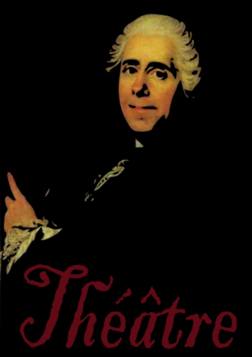 Marivaux - Théâtre [Création (personnelle)]